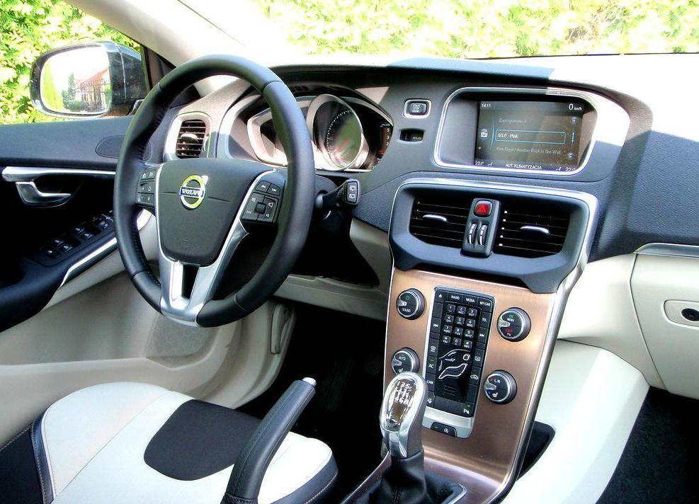 Wnętrze V40